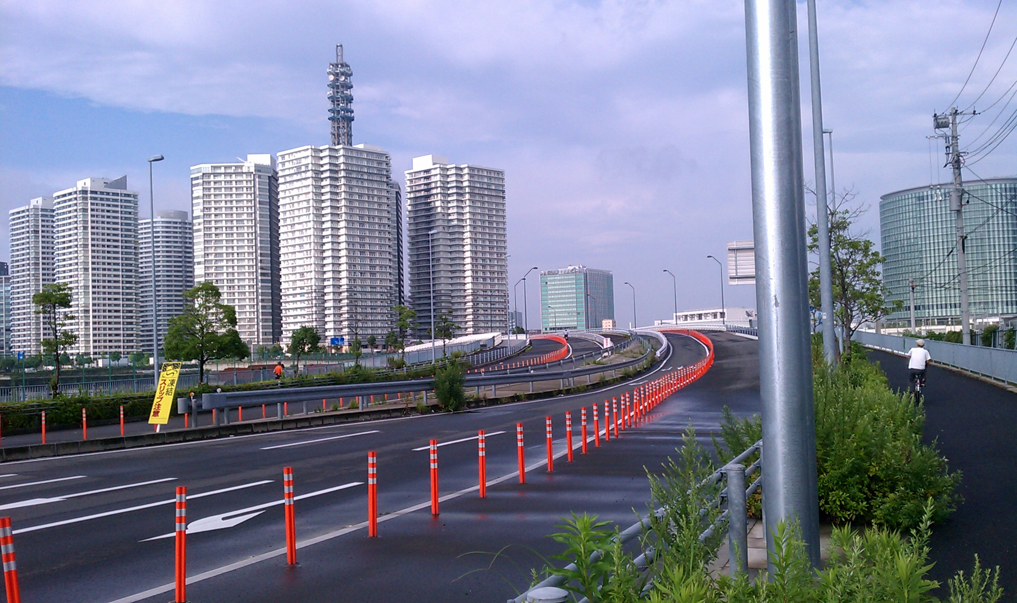 横浜港臨港幹線道路のみなとみらい橋に差し掛かる手前。横浜市中央卸売市場本場側より撮影。